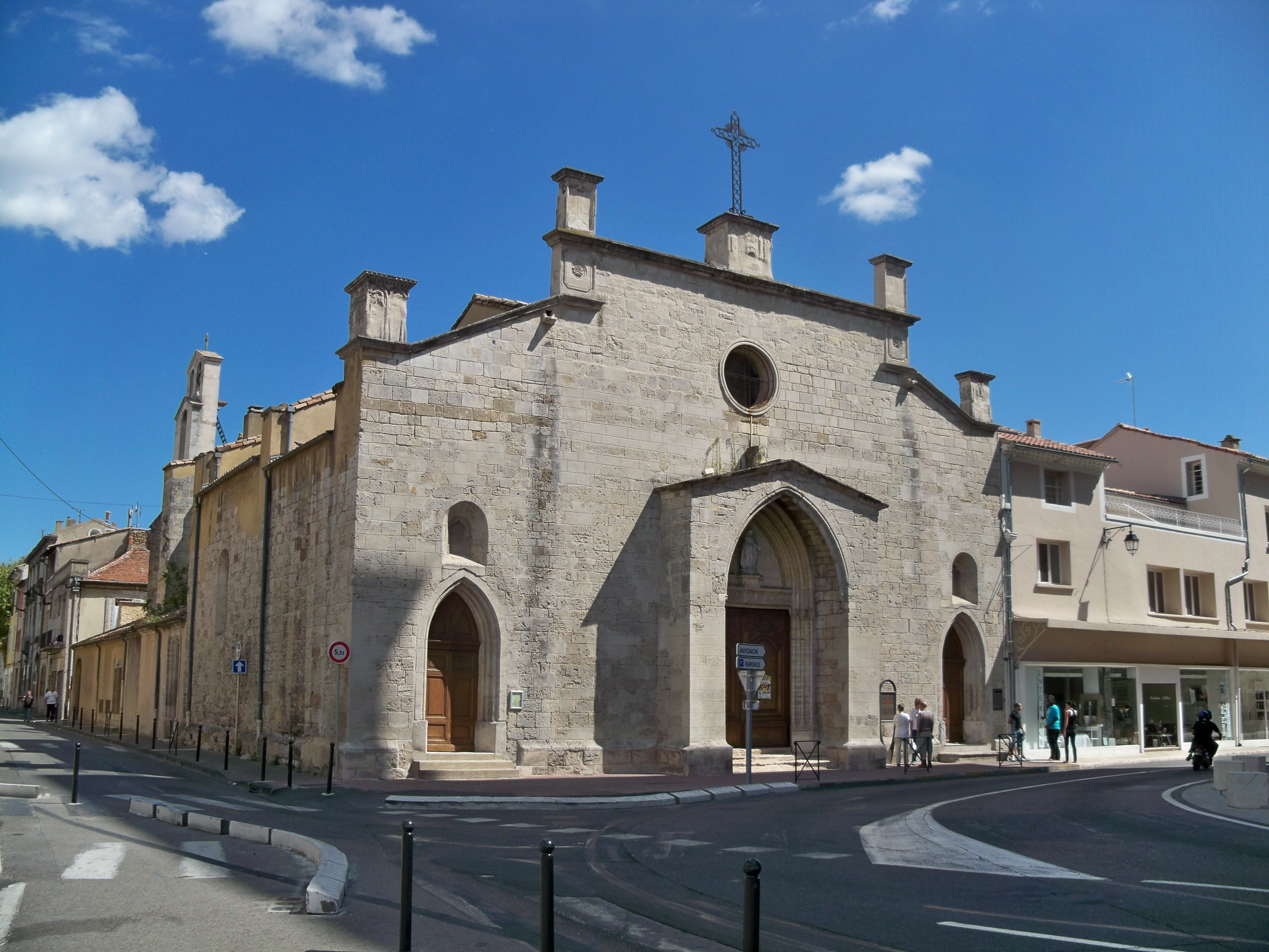 église Saint Florent, chapelle de l'ancien couvent des franciscains d'Orange, Vaucluse, France